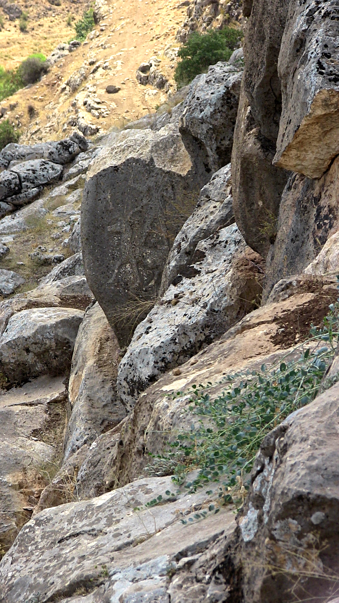 Späthethitisches Felsrelief am Karasu, türkische Provinz Gaziantep